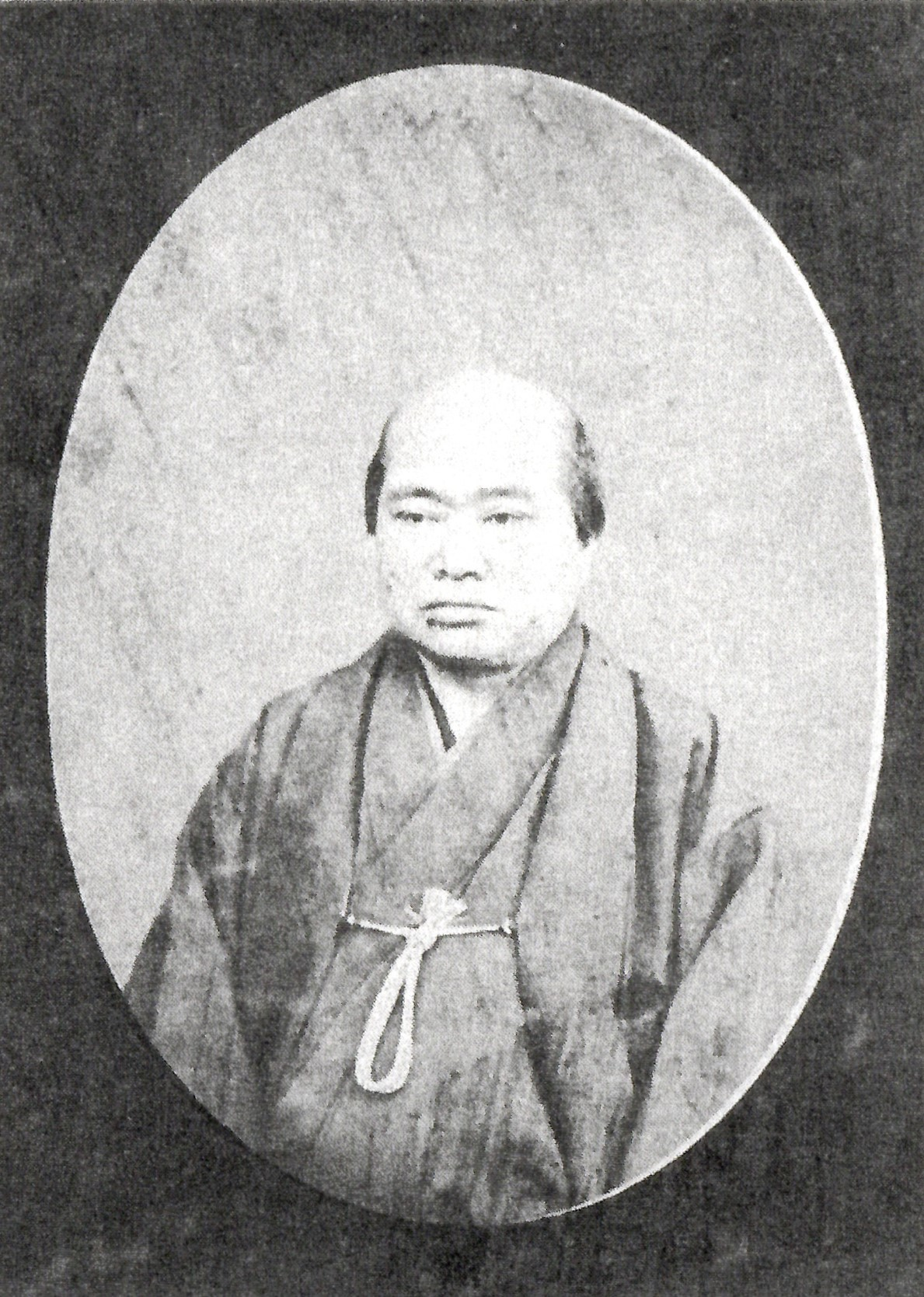 北条氏燕の肖像写真。